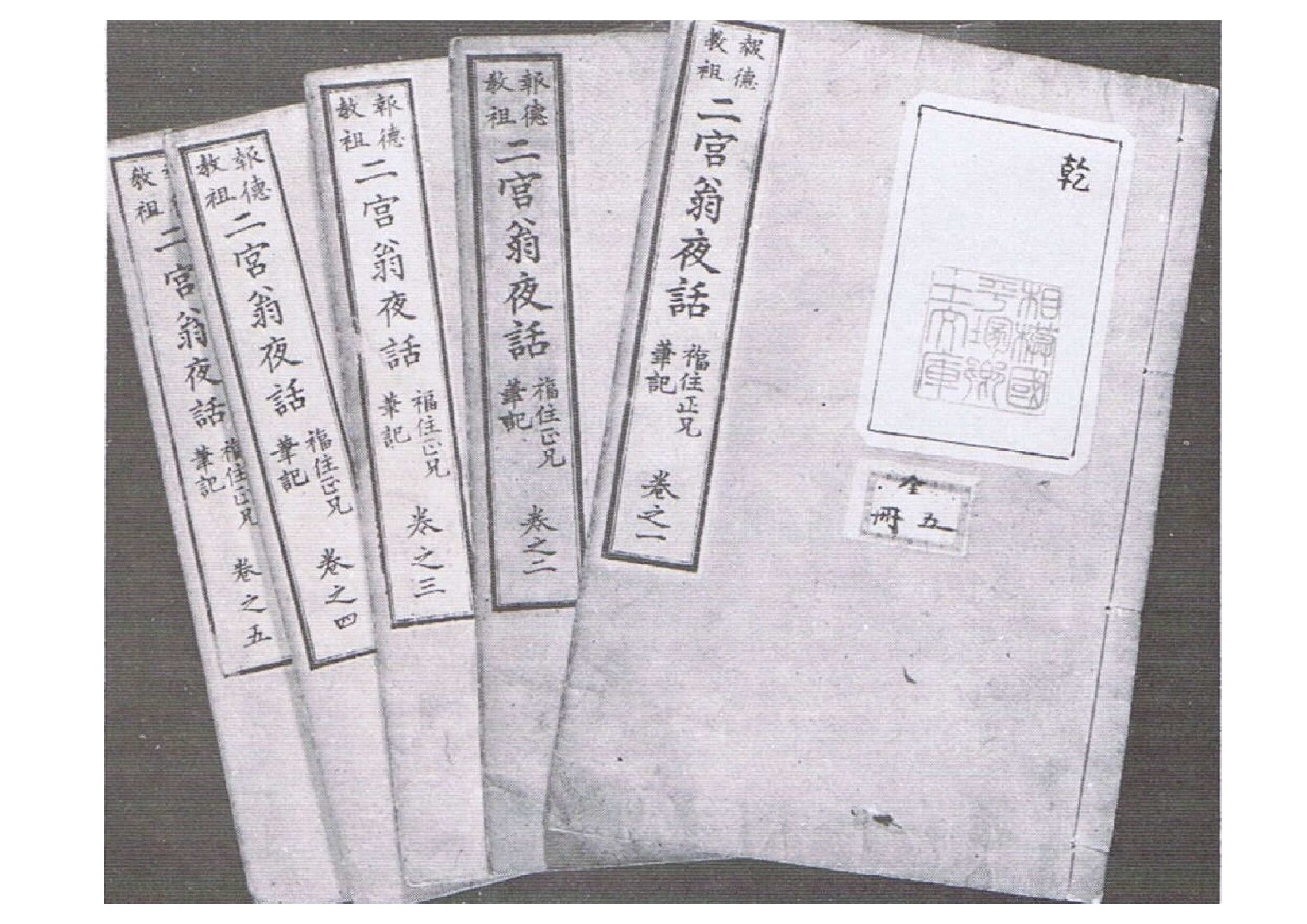 二宮翁夜話初版本画像